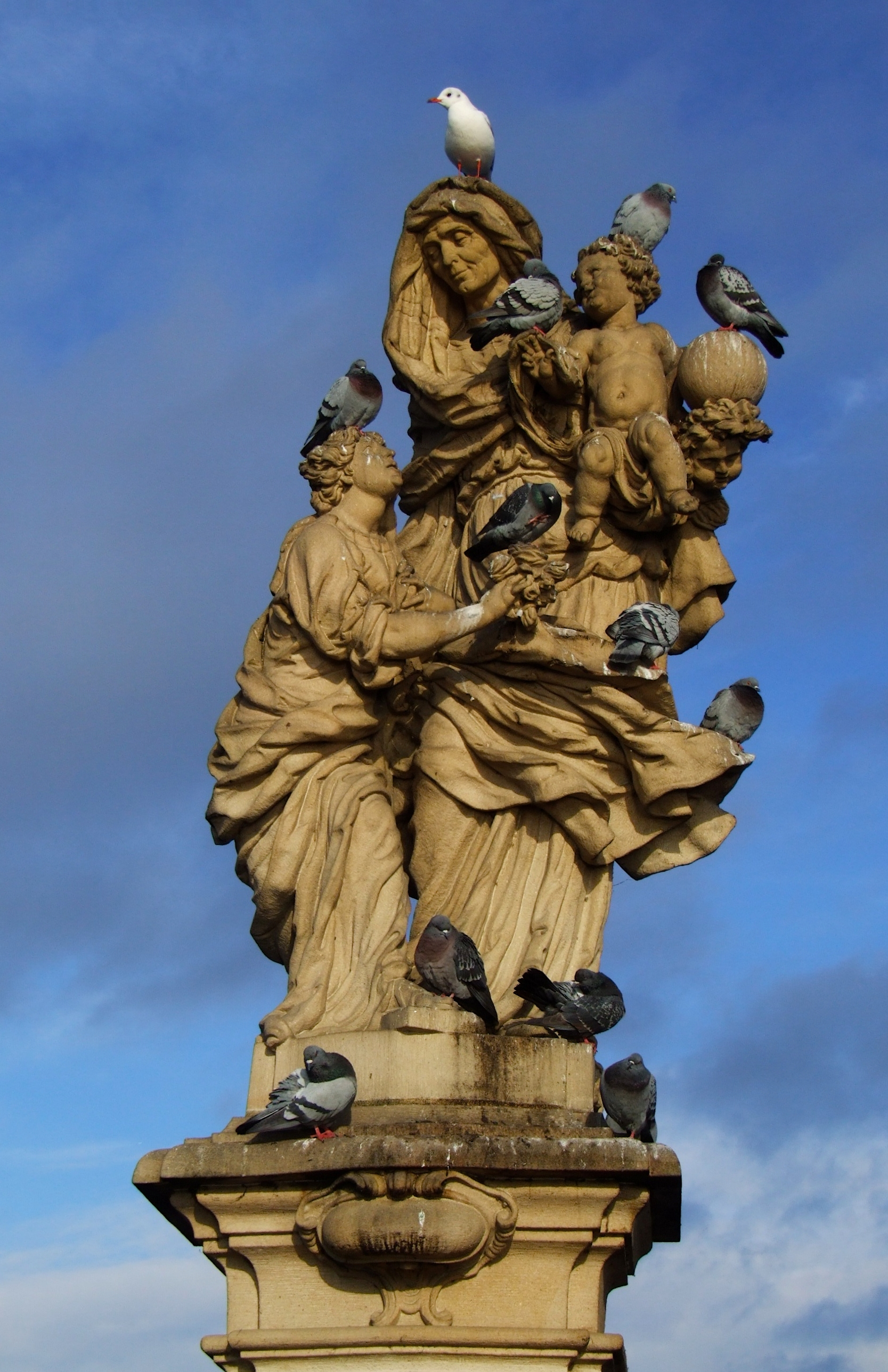 Svatá Anna - socha na Karlově mostě